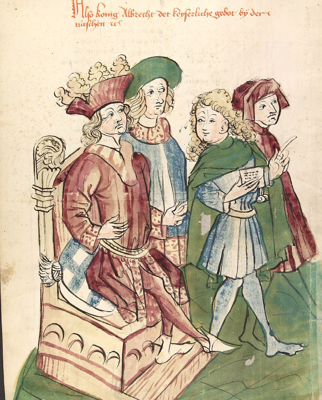 König Albrecht schickt wegen seiner Kaiserkrönung einen Boten zu Papst Bonifatius Werkstatt des Diebold Lauber Künstler unbekannt, um 1450, Zeichnung (ganzseitig), ungerahmt, Feder & koloriert, Wasserfarbe & Deckfarbe Der in prachtvoller Kleidung aus seinem Thron sitzende Albrecht I. schickt zwei Boten mit einem versiegelten Schreiben zu Papst Bonifatius, um von diesem die Bestätigung seiner Wahl zu erhalten. Einer der Boten hat sich noch einmal zum König hin umgedreht. Neben dem Thron steht ein Höfling, der den beiden Boten nachschaut.